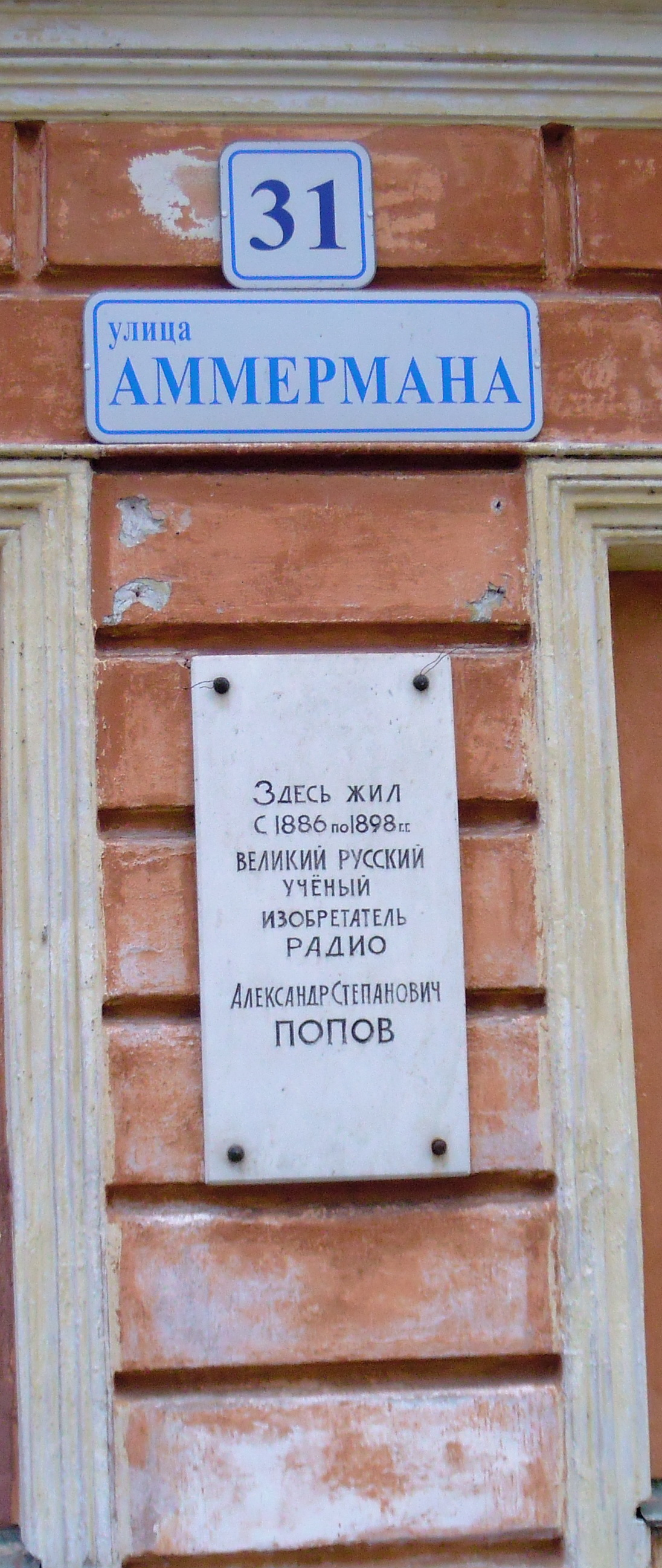 Кронштадт. Дом, где жил изобретатель радио А.С. Попов